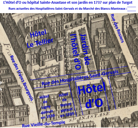 Hôtel d'O en 1737